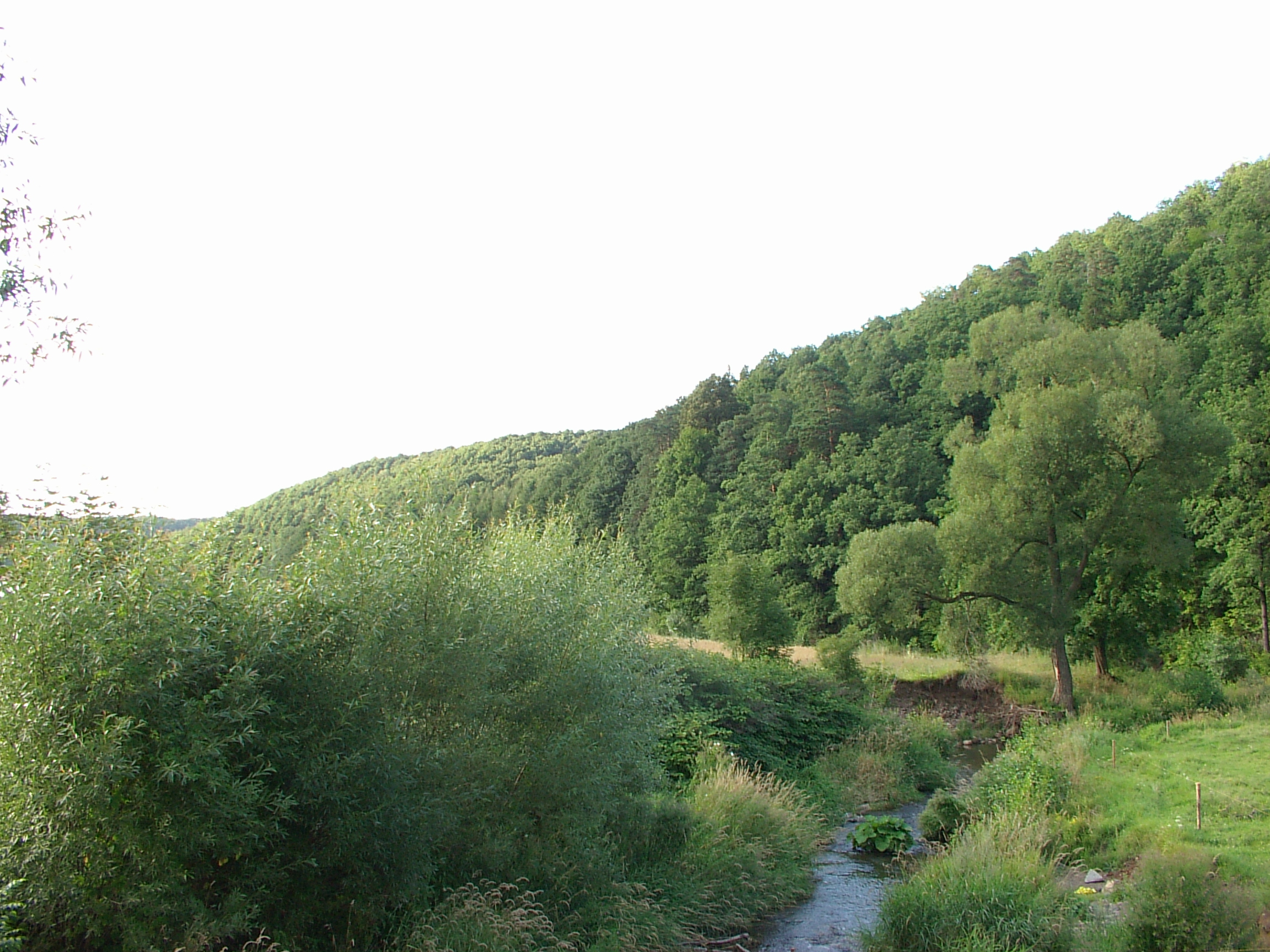 Rzeka Strzegomka we wsi Chwaliszów